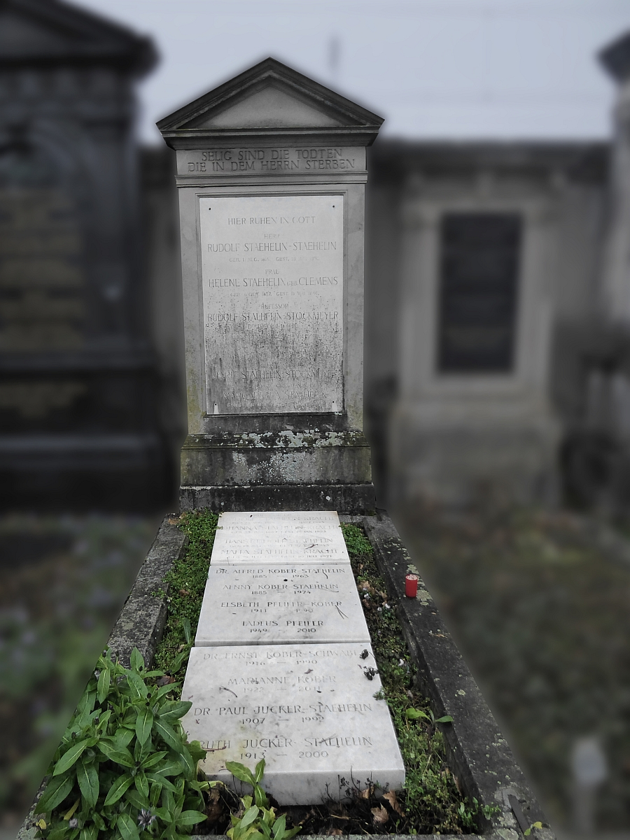 Familengrab Stähelin-Clemens-Stockmayer-Kracht-Kober-Pfeifer-Schwabe-Jucker. Grab auf dem Friedhof Wolfgottesacker, Basel